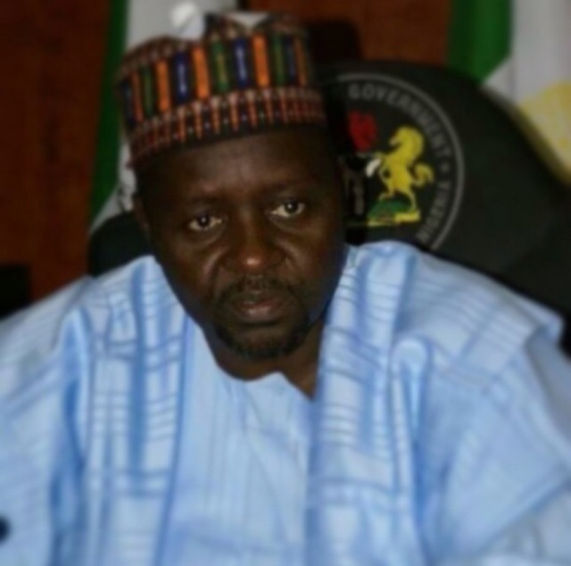 Senator Mamman B. Ali